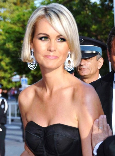 Laeticia Hallyday au festival de Cannes